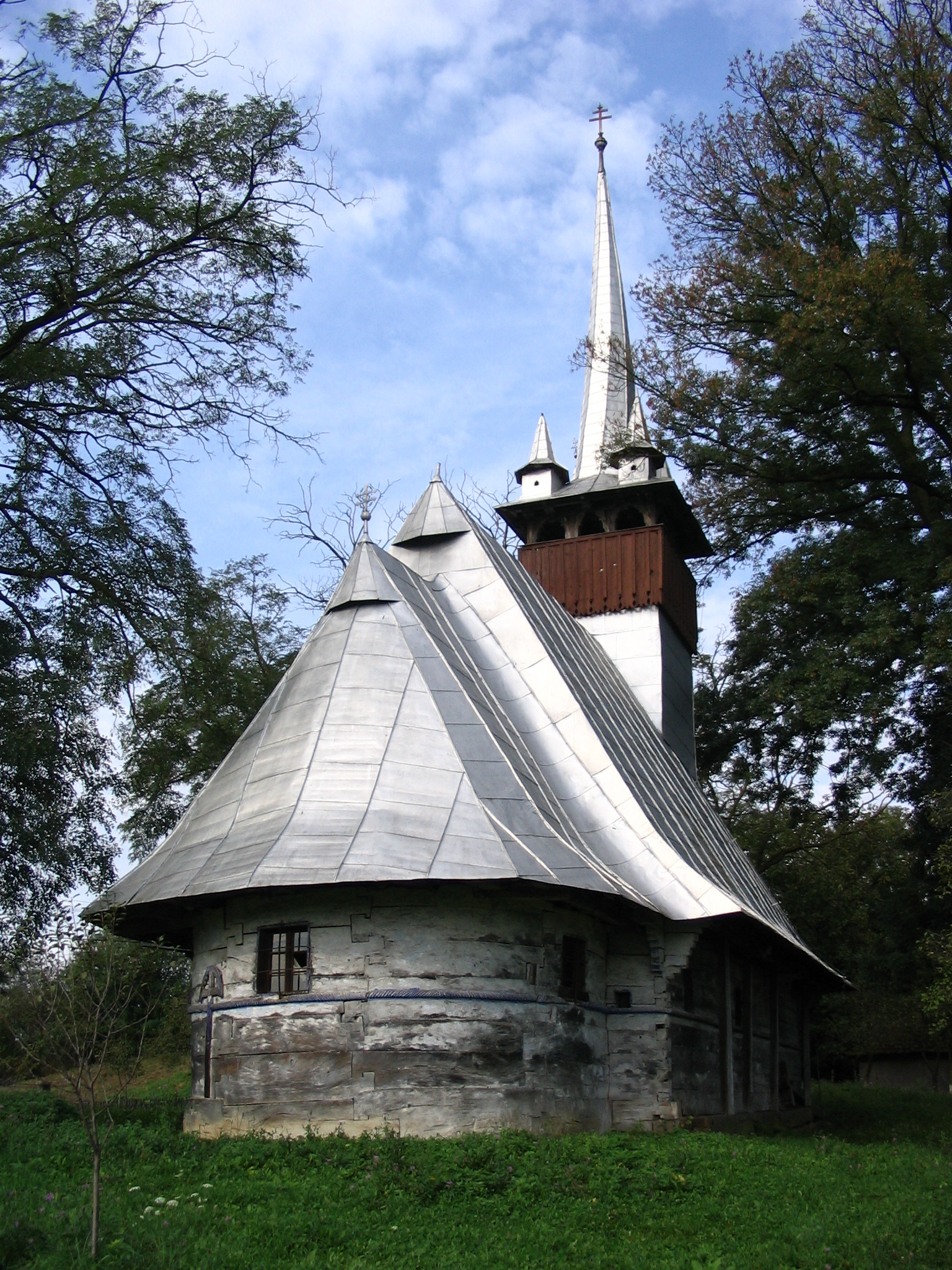 Biserica de lemn din Chieşd, judeţul Sălaj. Autor: Bogdan Ilieş Data: octombrie 2005